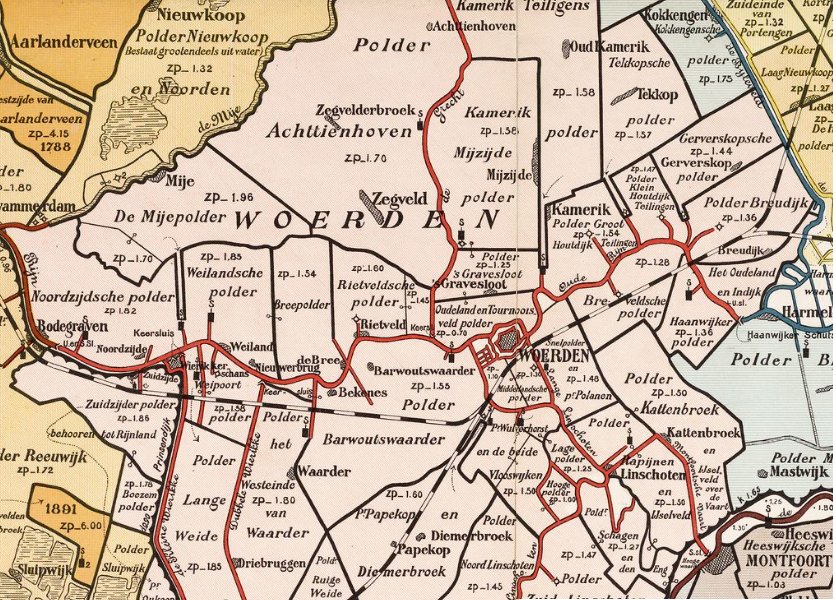 Groot-Waterschap van Woerden